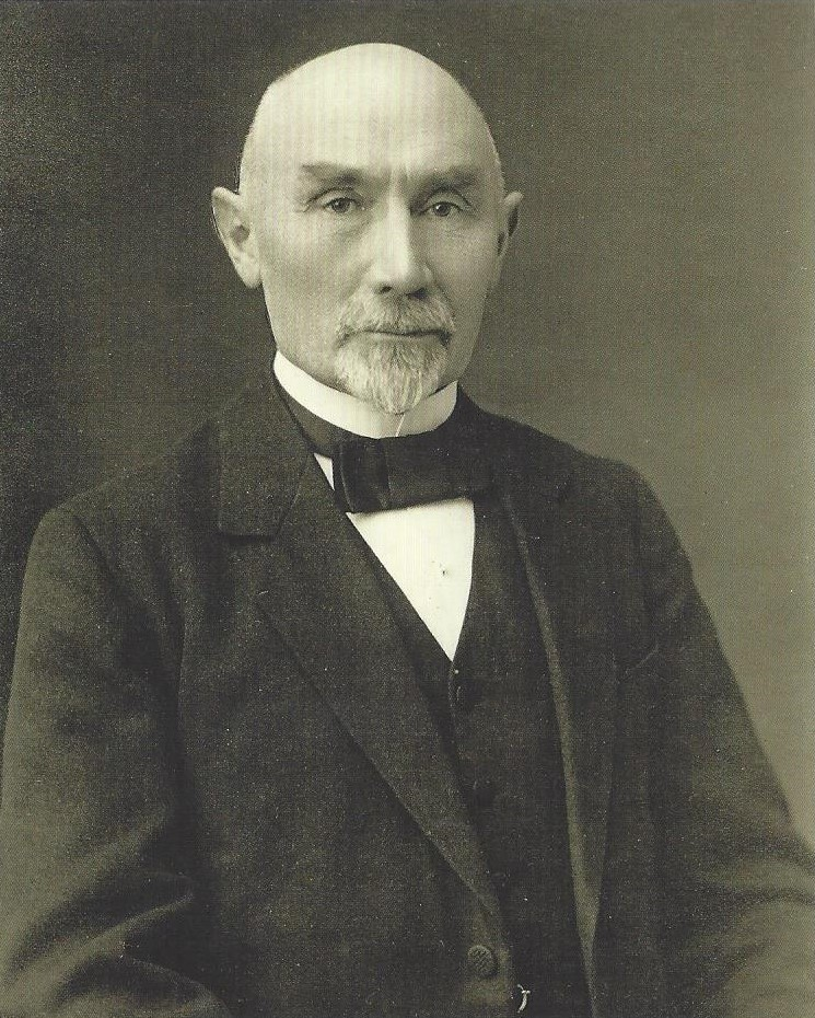 Karl (Wilhelm Adolf Fritz) Senst (1860–1937), letzter Küchenmeister der mecklenburgischen Landesklöster